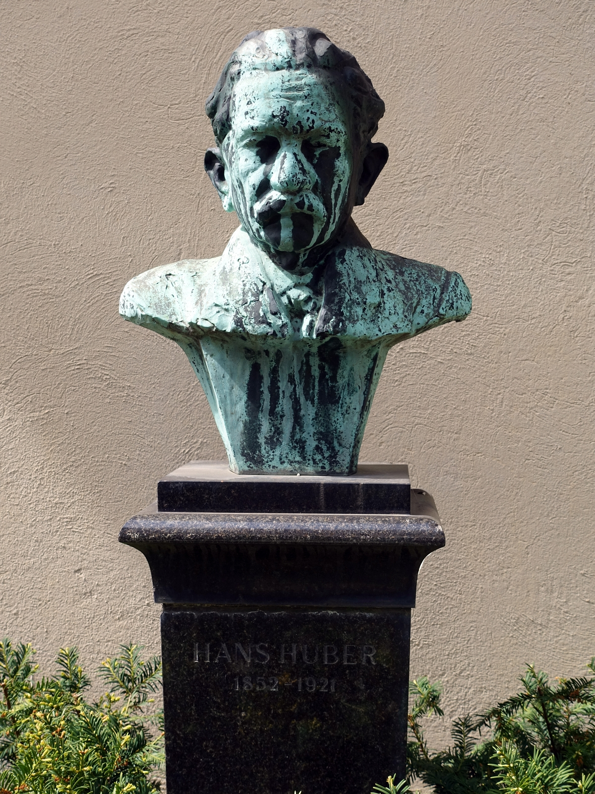 Büste von 1921 für Dr. Hans Huber (1852-1927) Komponist, Pianist und Musikpädagoge. Von Otto Roos (1887-1945), Bildhauer, Maler, Zeichner. Standort: Hof der Musik Akademie Basel